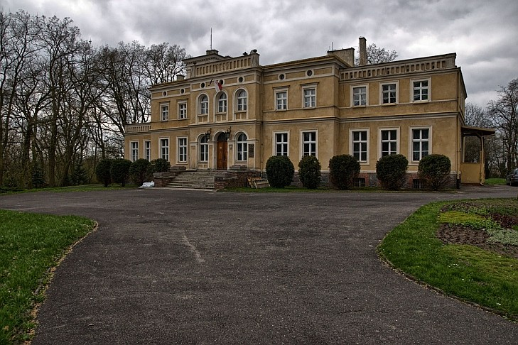 Uzarzewo Dwór Żychlińskich